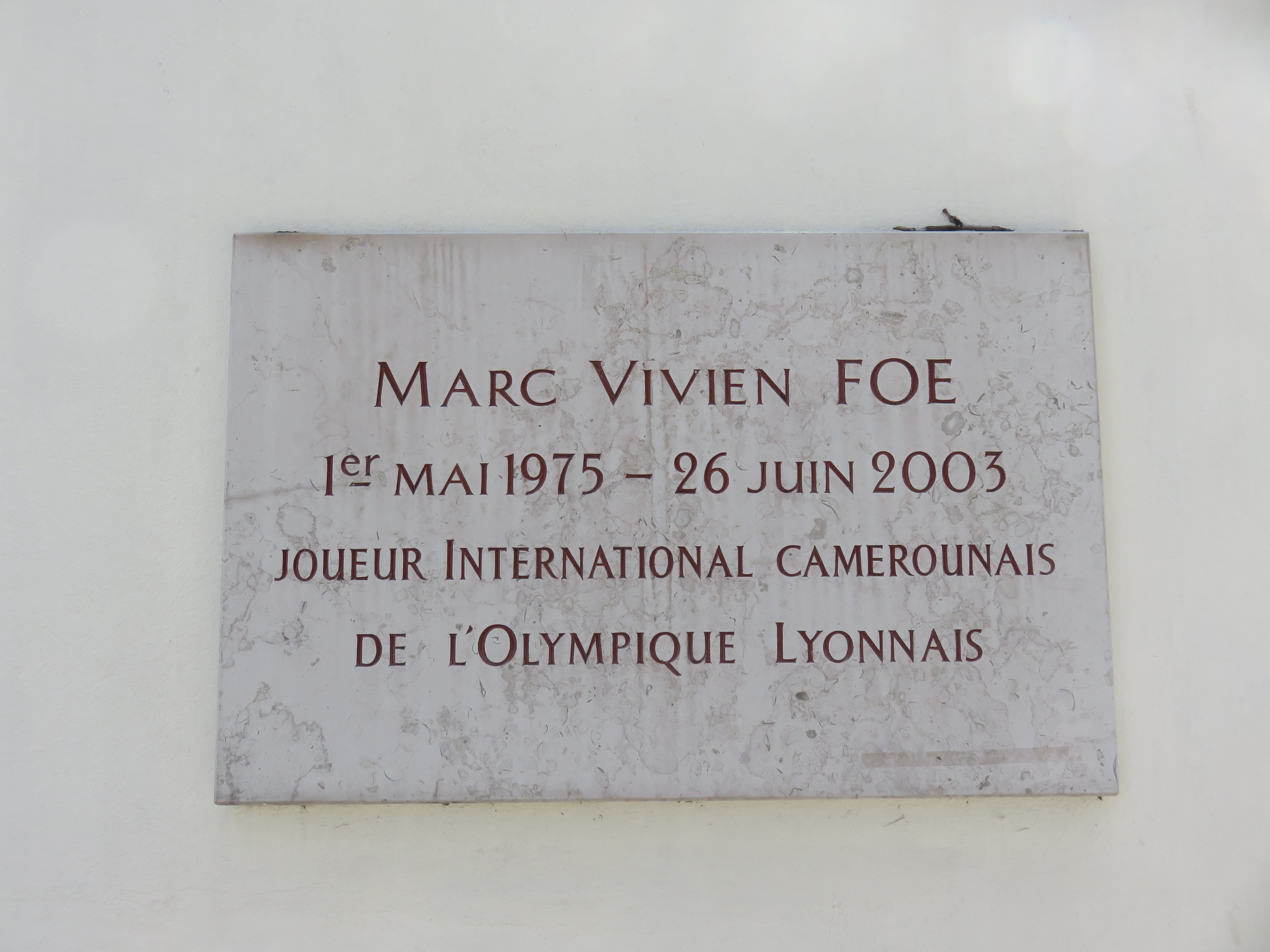 Plaque commémorative de Marc-Vivien Foé, au stade Marc-Vivien Foé, dans le 3e arrondissement de Lyon.